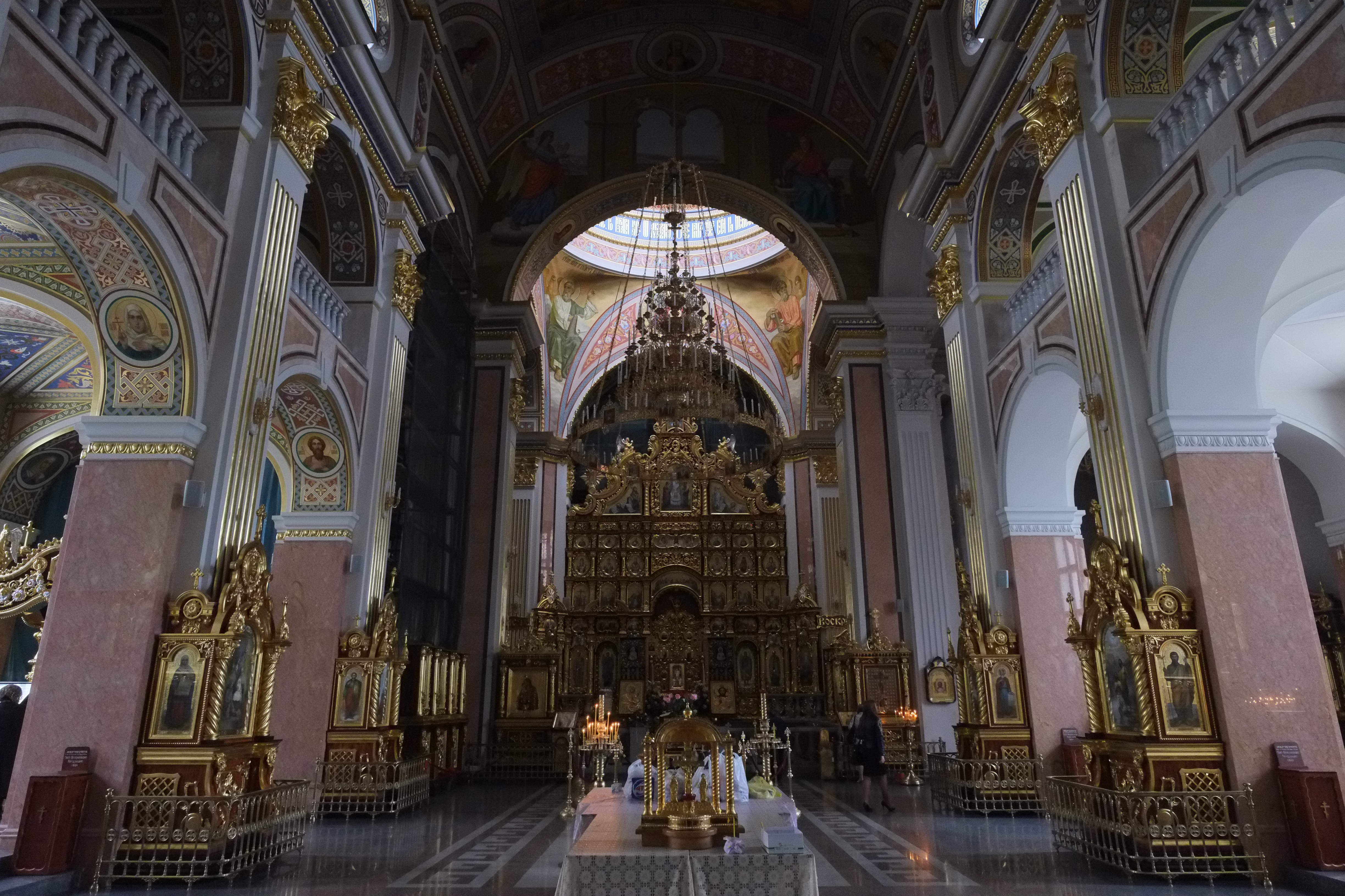 DrupalCamp Donetsk 2014